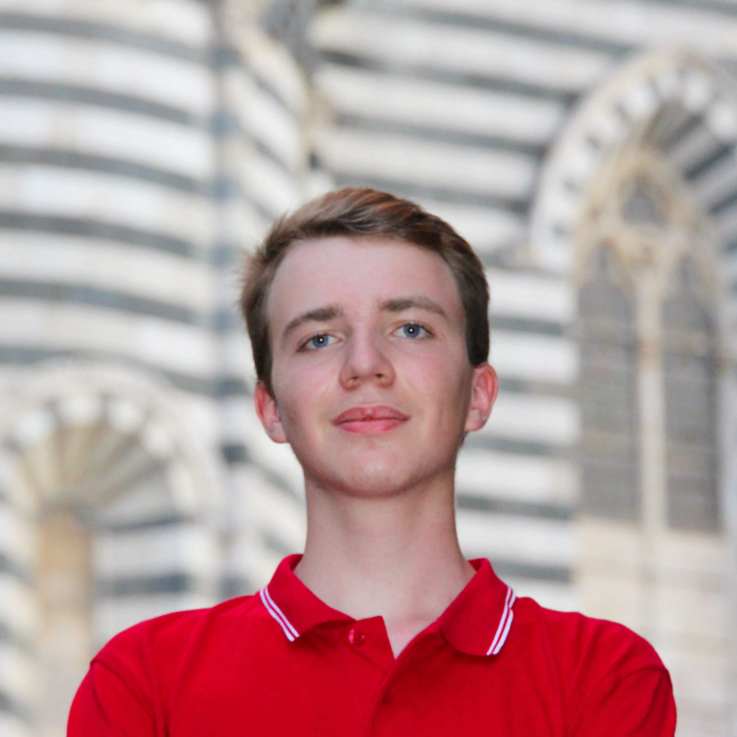 Ein Porträt von Maximilian Janisch